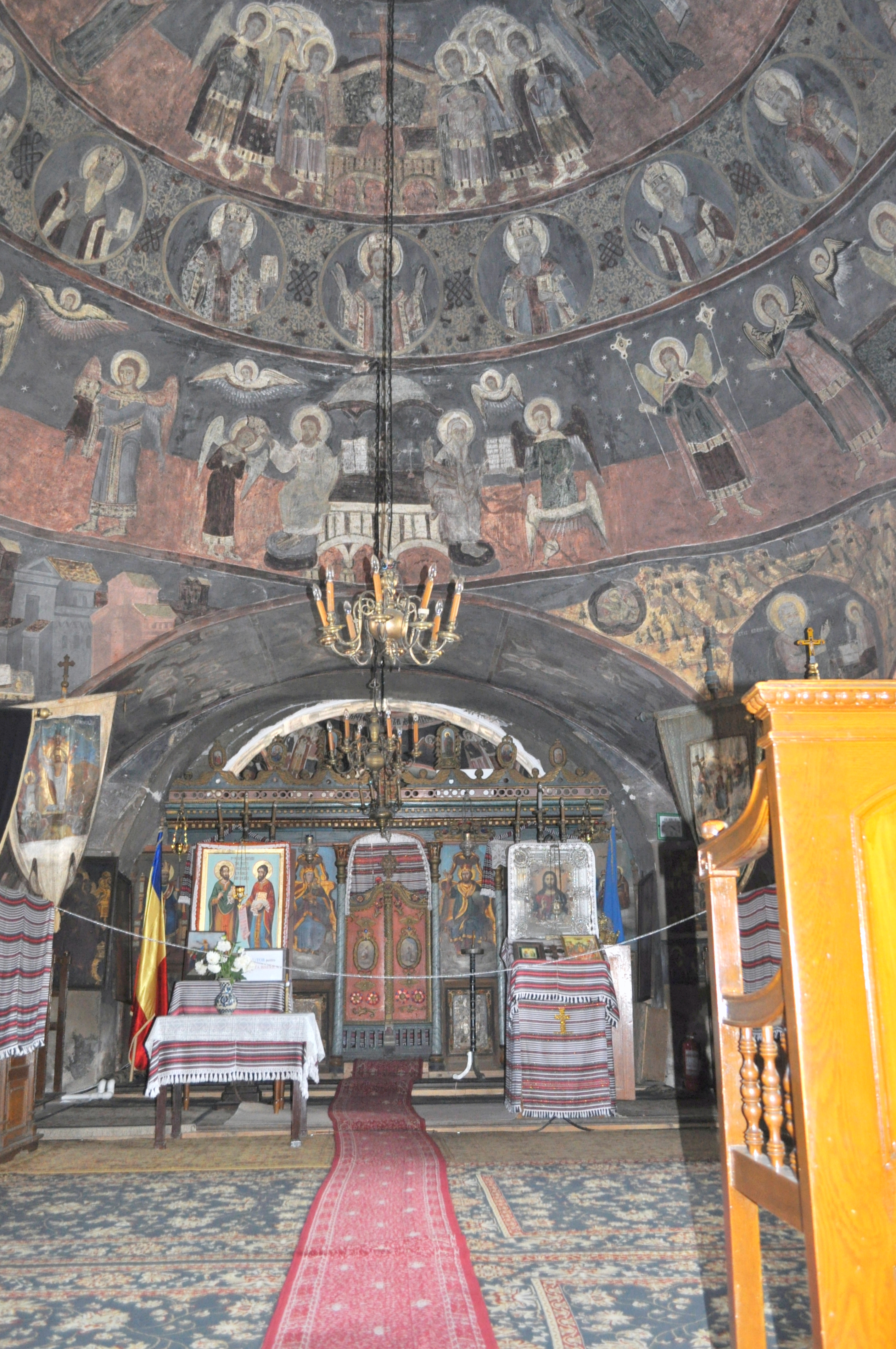 Biserica „Sfânta Treime” din Sibiel, județul Sibiu